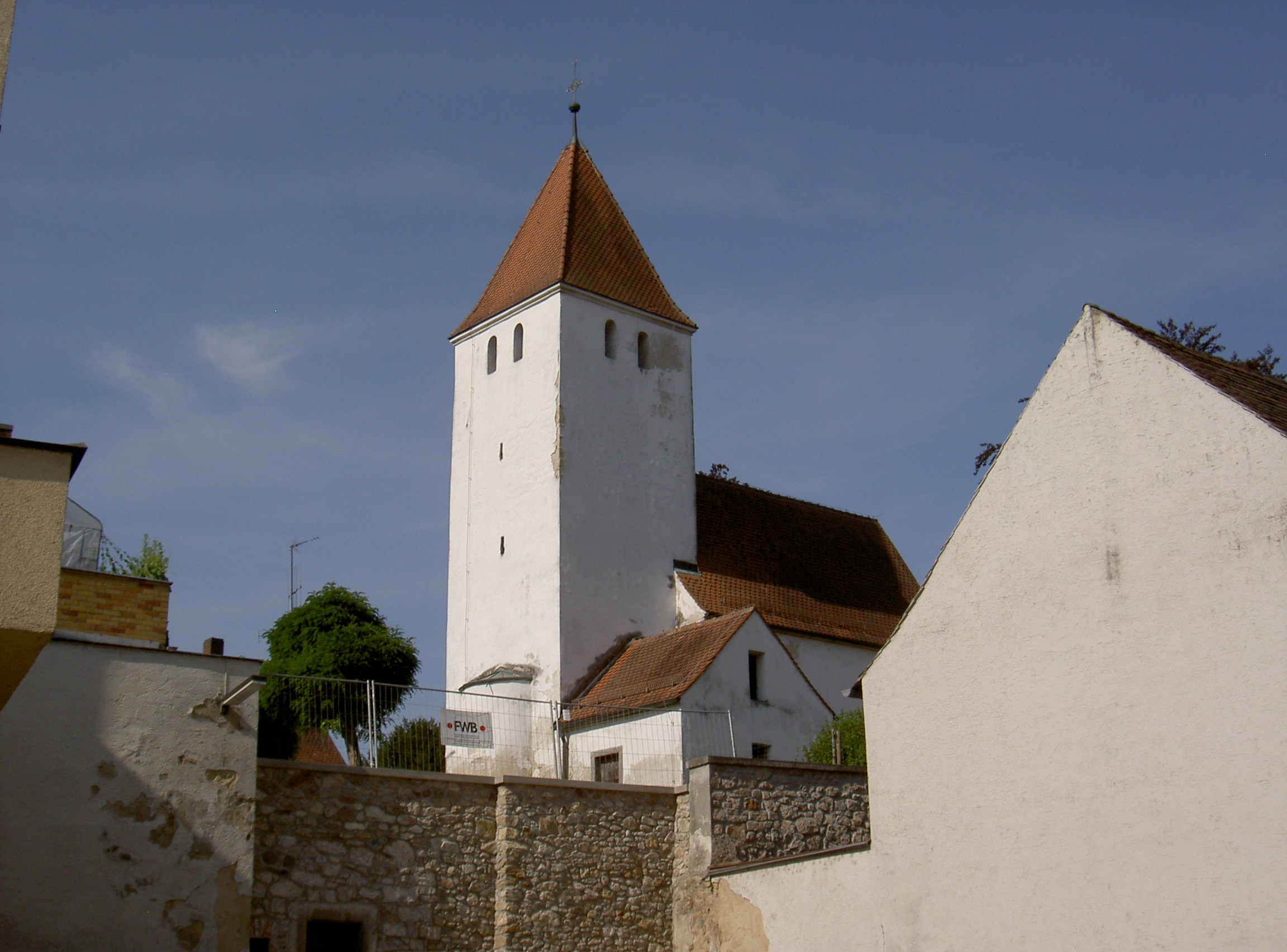 Neunburg vorm Wald St. Jakob von Norddosten mit mittelalterlicher Friedhofsmauer